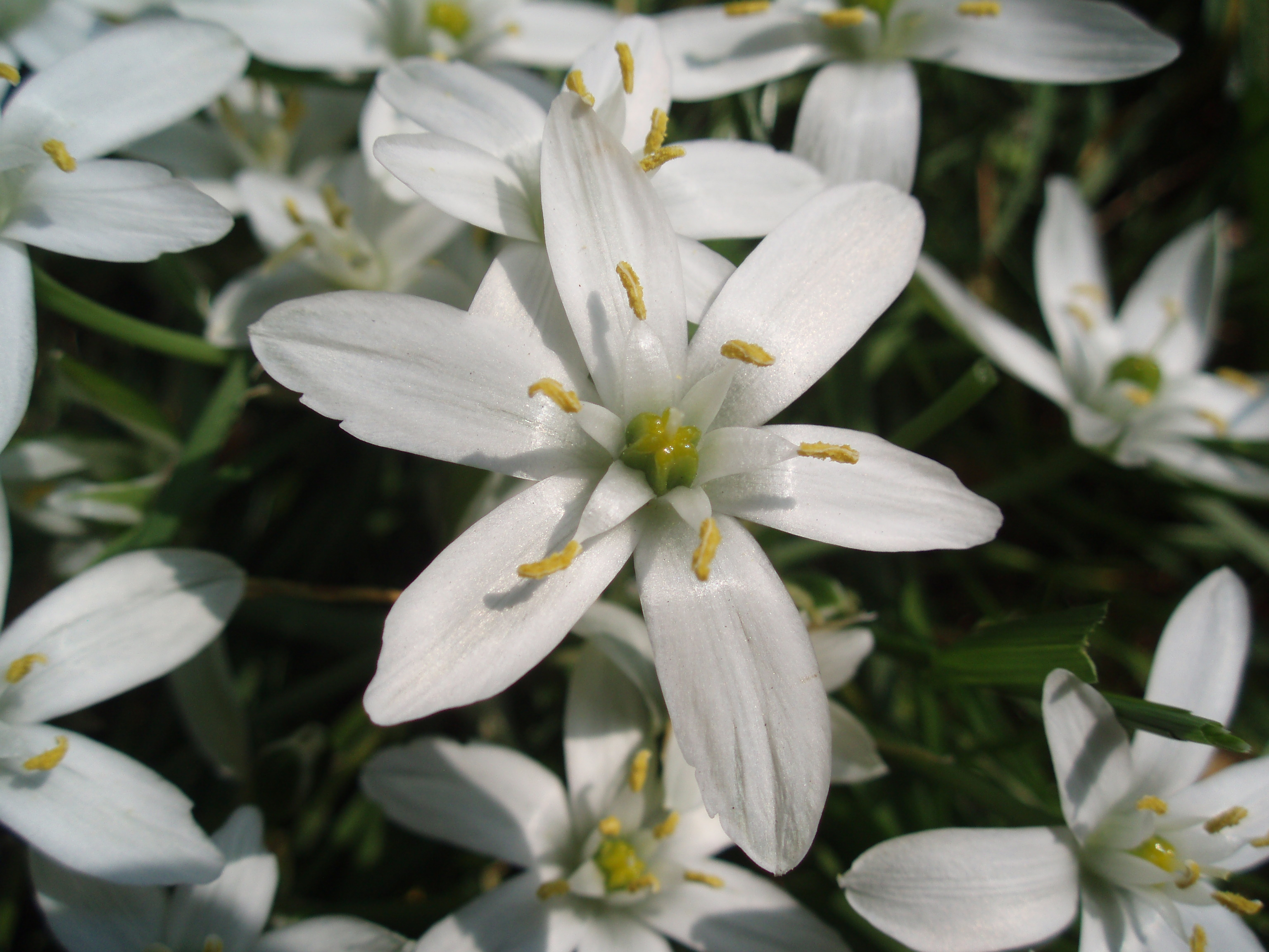 Gewone vogelmelk (Ornithogalum umbellatum) in het Van Nahuyspark te Zwolle.